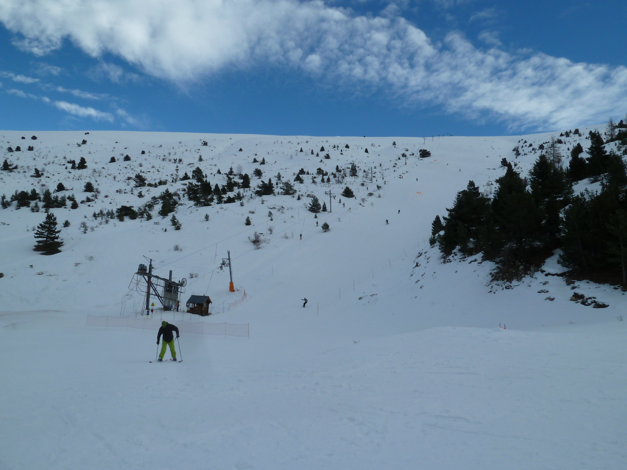 Téléski de la Corniche et fin de la piste rouge desservi dans la station Céüze 2000. Au sommet, le pic de Céüze culminant à 2019m.